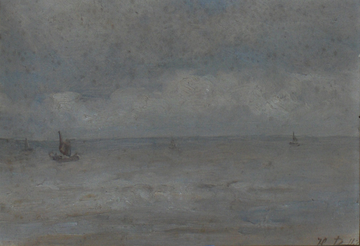 "Marine" olieverf op doek (22 x 32 cm) door Hubert Bellis (1831-1902); privé bezit